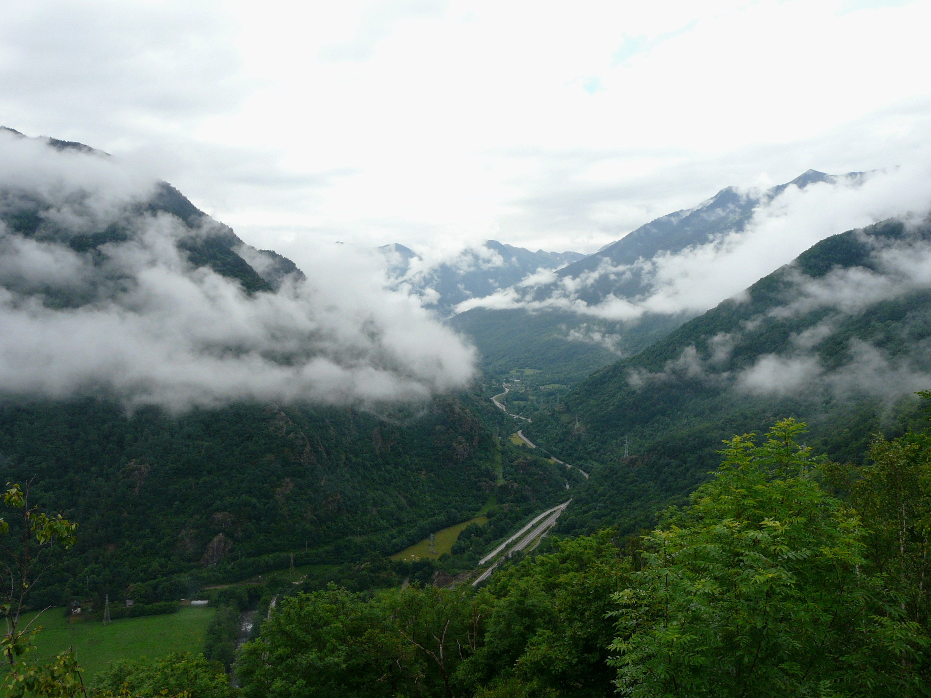 Le Val d'Aran en amont de Bossòst, Catalogne, Espagne.